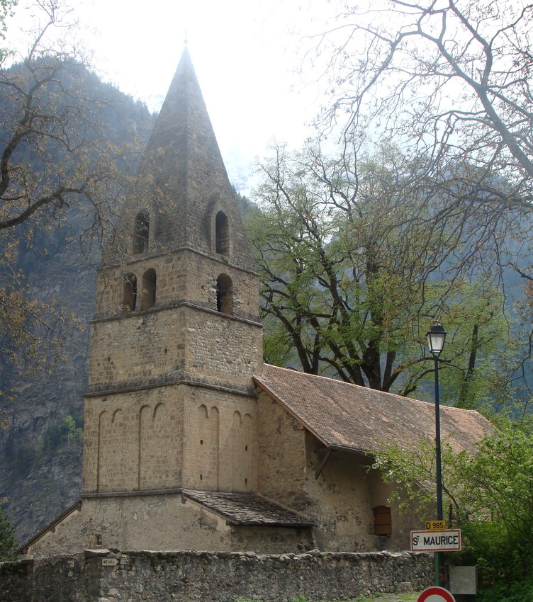 L'église de Saint-Maurice-en-Valgodemard (Hautes-Alpes), clocher et toiture du flanc nord.